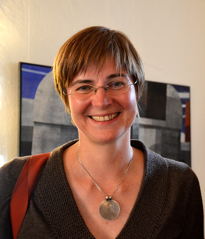 Momentaufnahme der Vernissage der Ausstellung Niemandsland, der Retrospektive des Künstlers János Nádasdy auf Schloss Landestrost vom 21. Juni bis zum 3. August 2014 ...